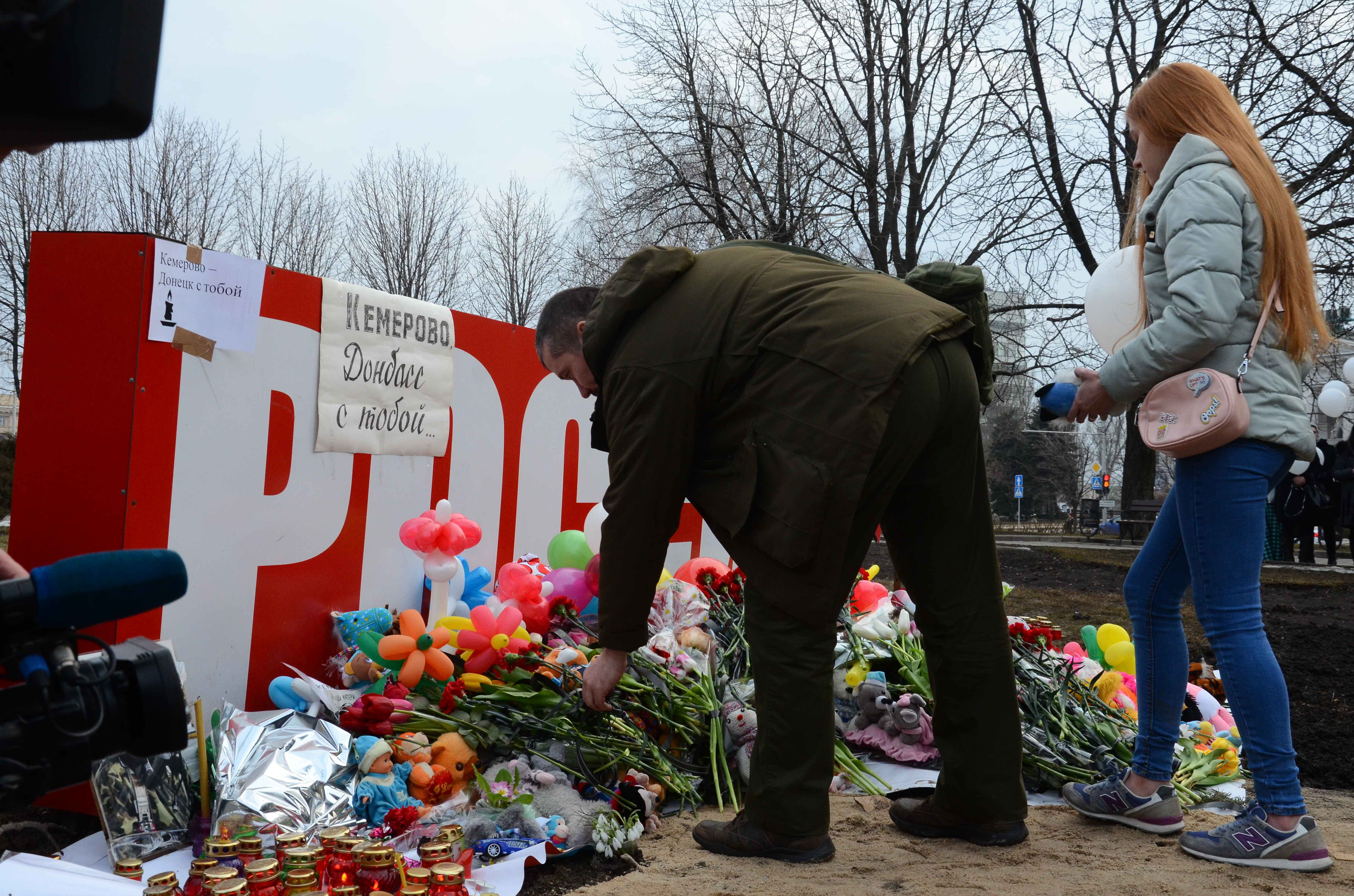 Мероприятие в Донецке память о погибших в Кемерово